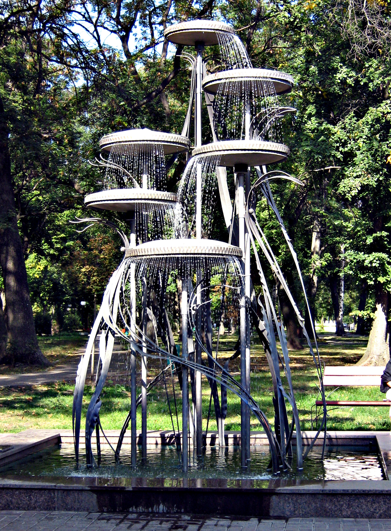 Фонтан в Молодежном парке. Харьков. Украина.